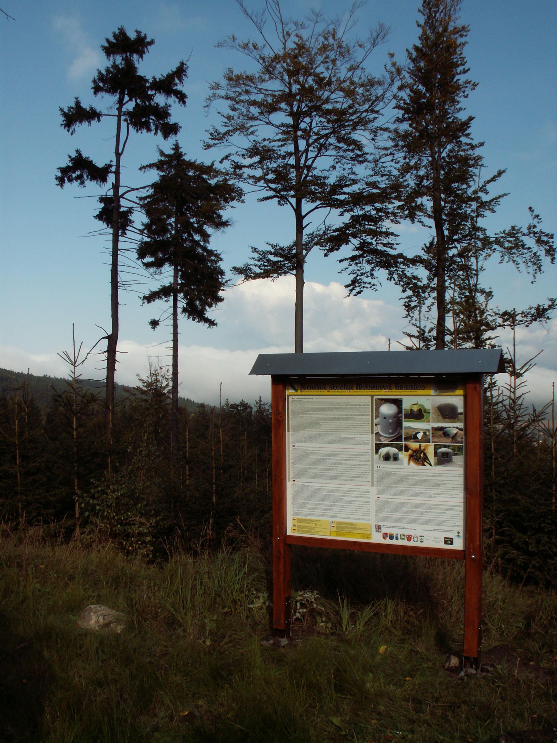 Tabule naučné stezky Betonová hranice u Mladkova